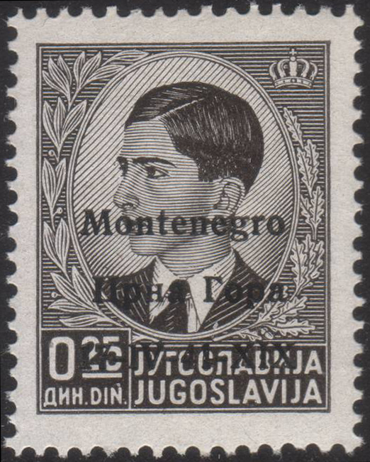 Почтовая марка Черногории под итальянской оккупацией. Надпечатка на марке Югославии 1939 года. Stamp of Montenegro under the Italian occupation.